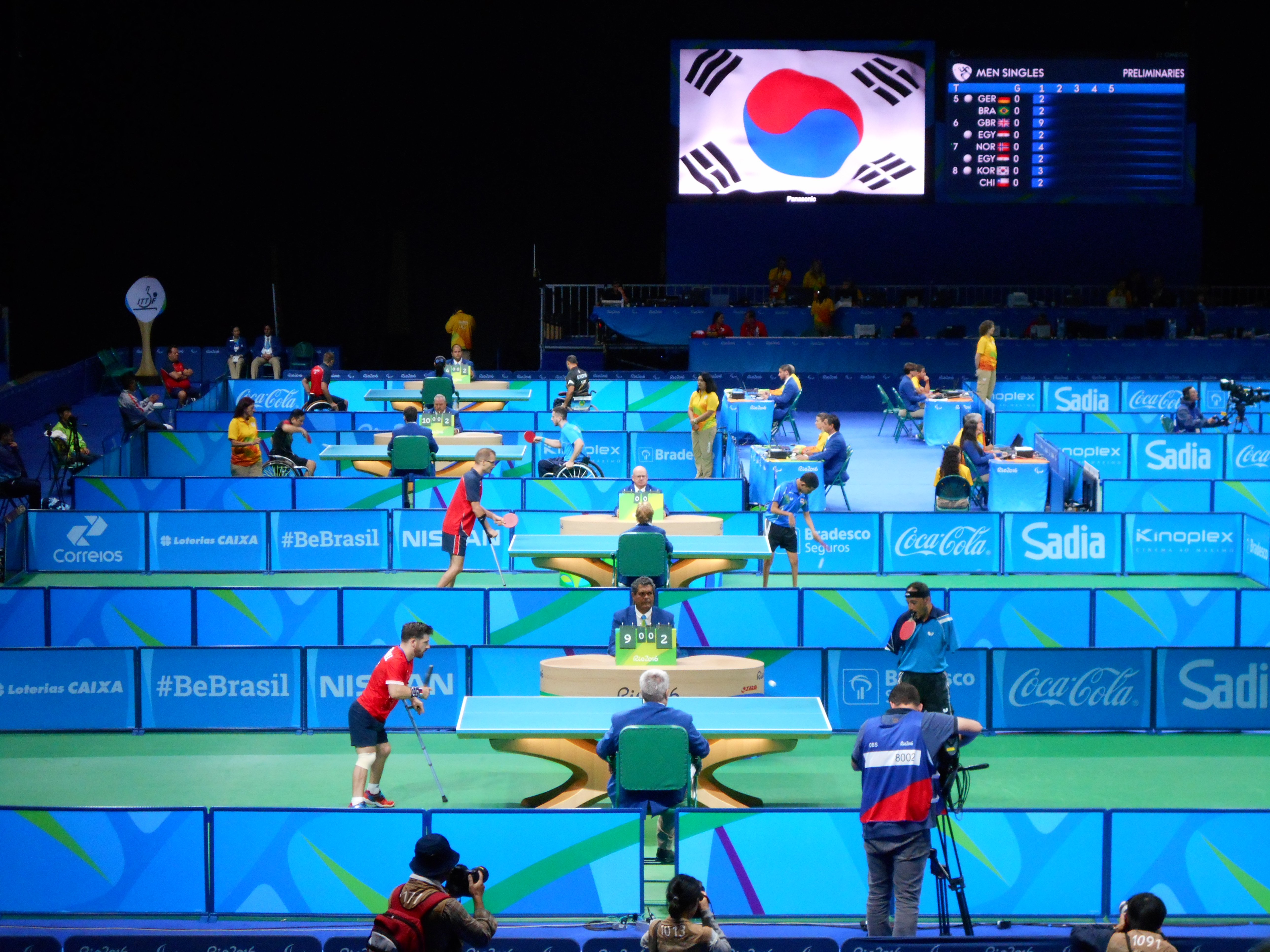 Primeira fase do torneio de tênis de mesa disputadas no Riocentro durante os Jogos Paraolímpicos Rio 2016.